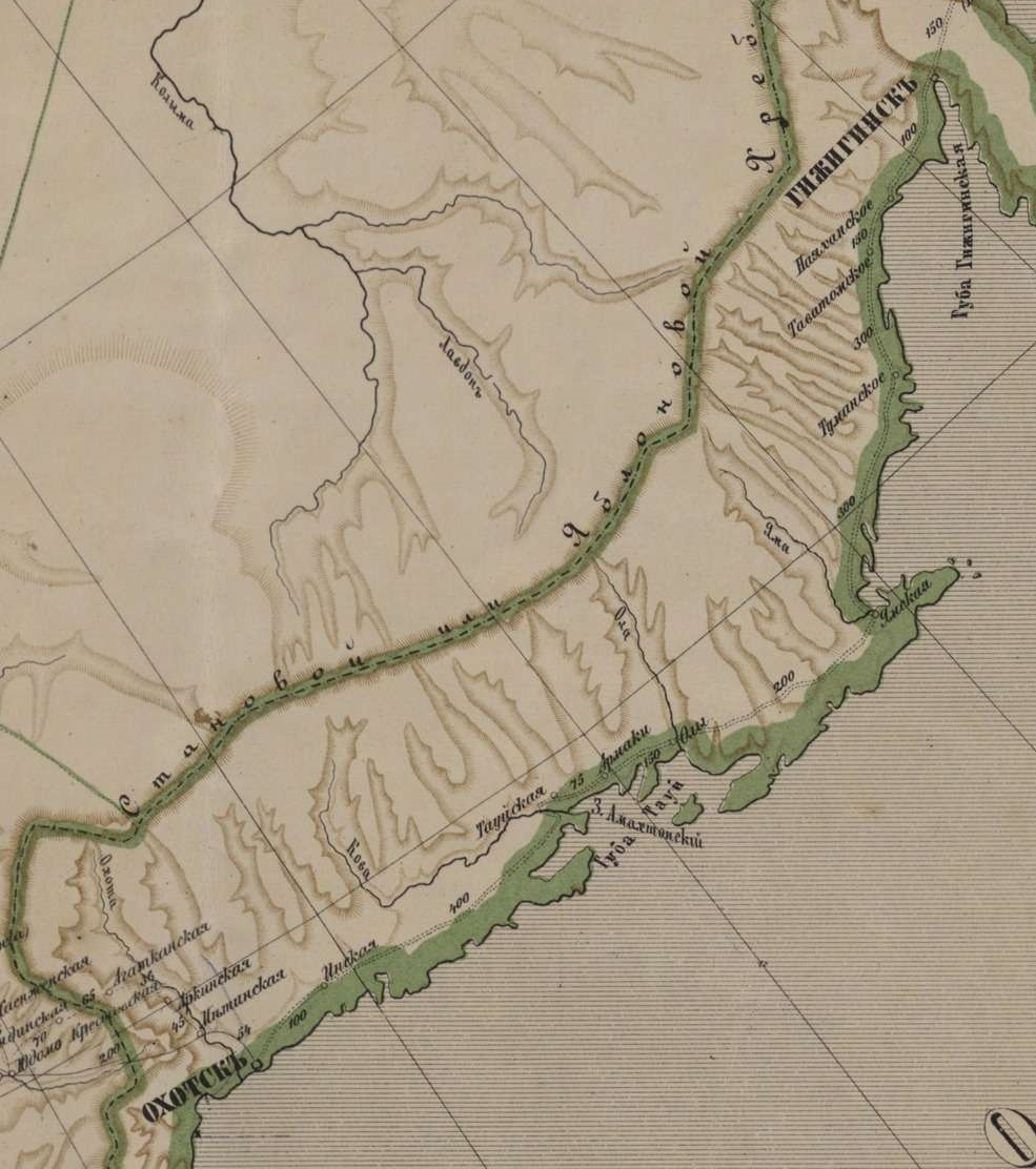 Фрагмент Почтовой карты Азиатской России, Сибири, 1871 г. с изображением Охотско-Гижигинского тракта